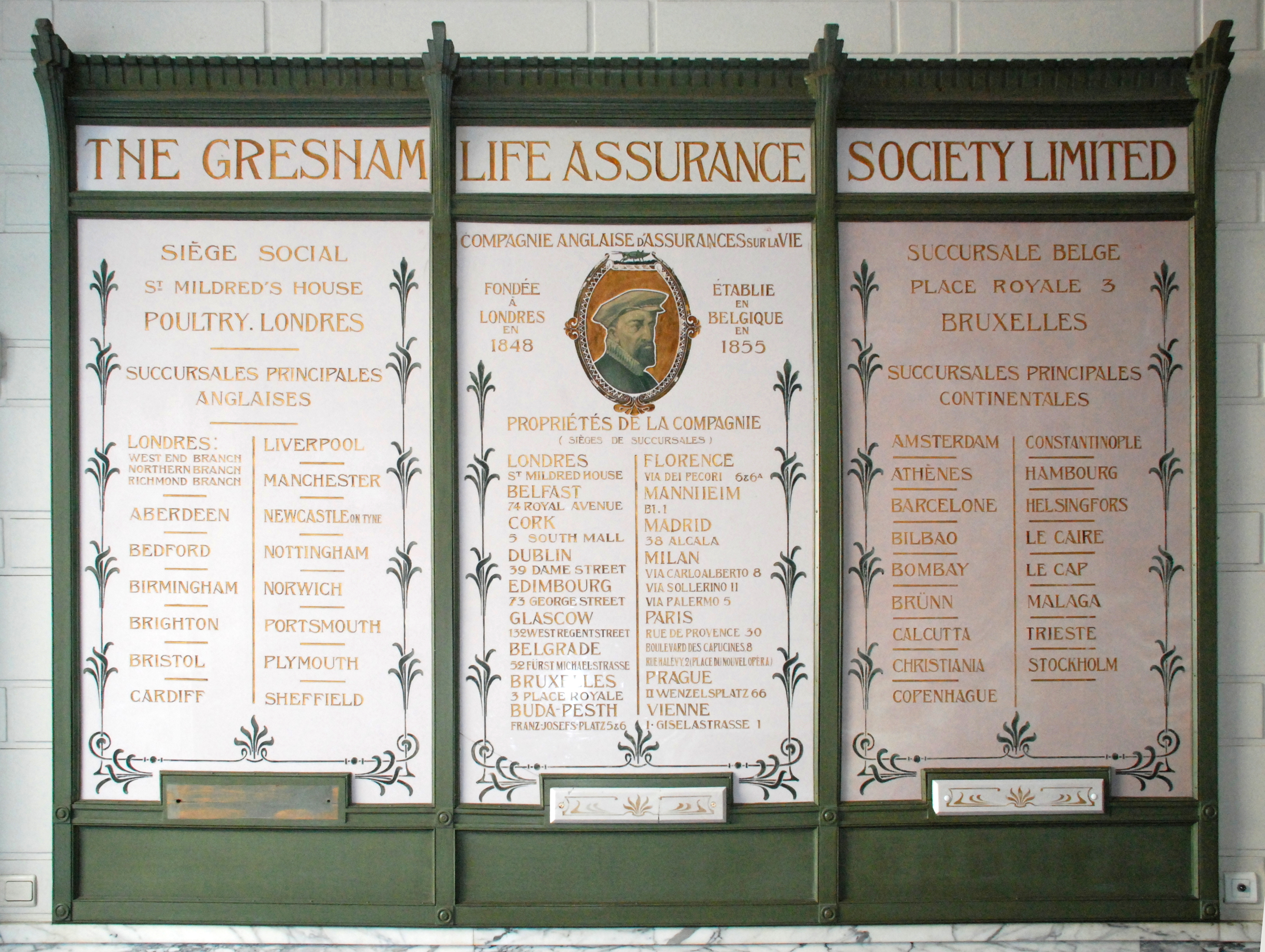 Belgique - Bruxelles - Hôtel Gresham (Art nouveau)